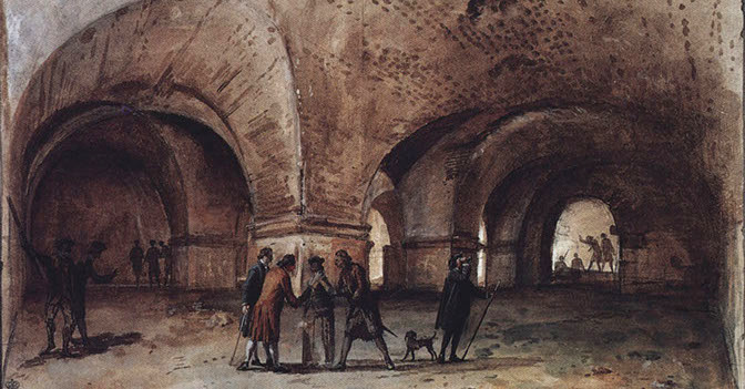 Sala centrale delle Terme Achilliane riprodotte da Jean Houel